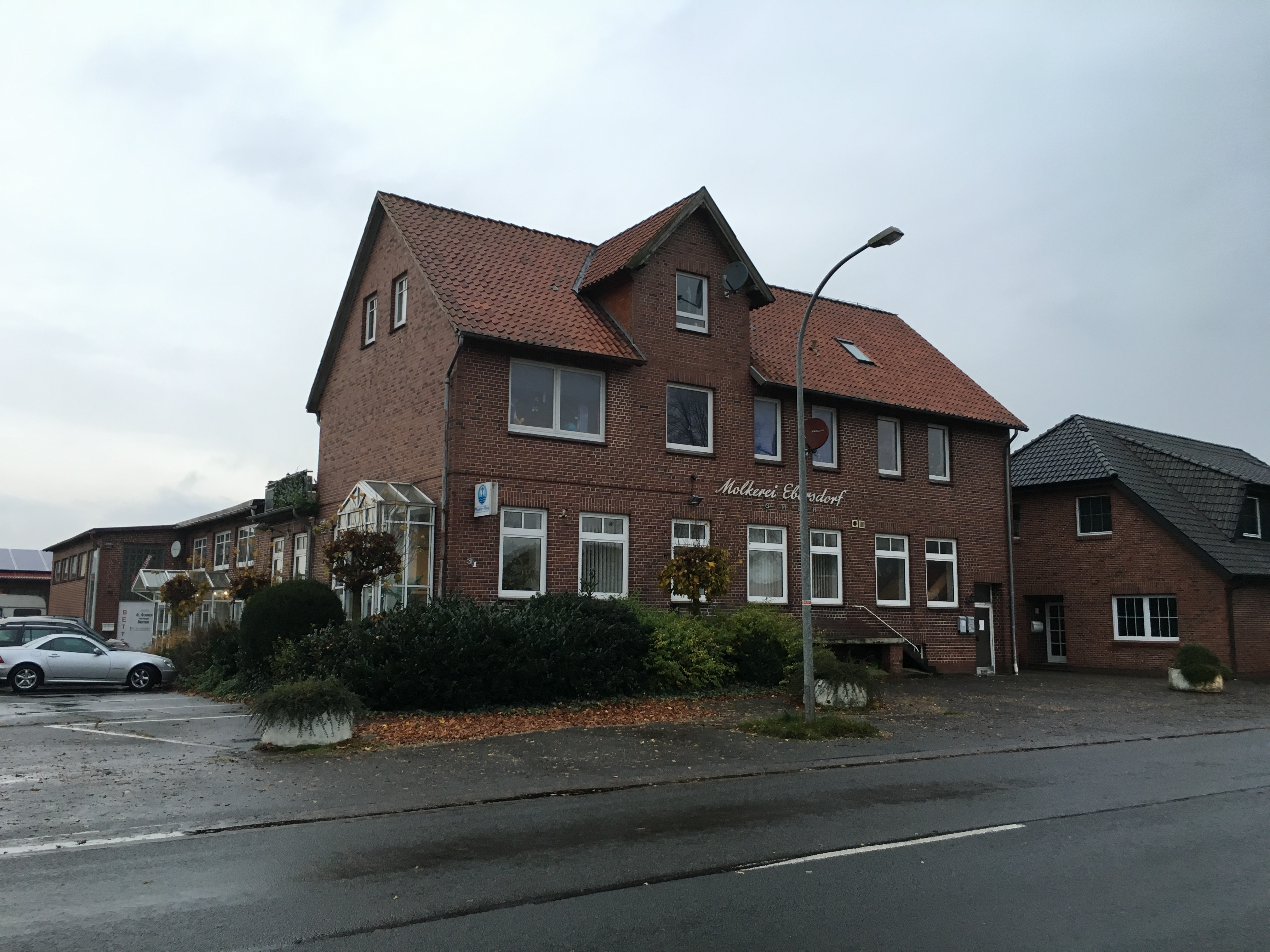 Meieree in Eversdörp, Landkreis Rodenborg